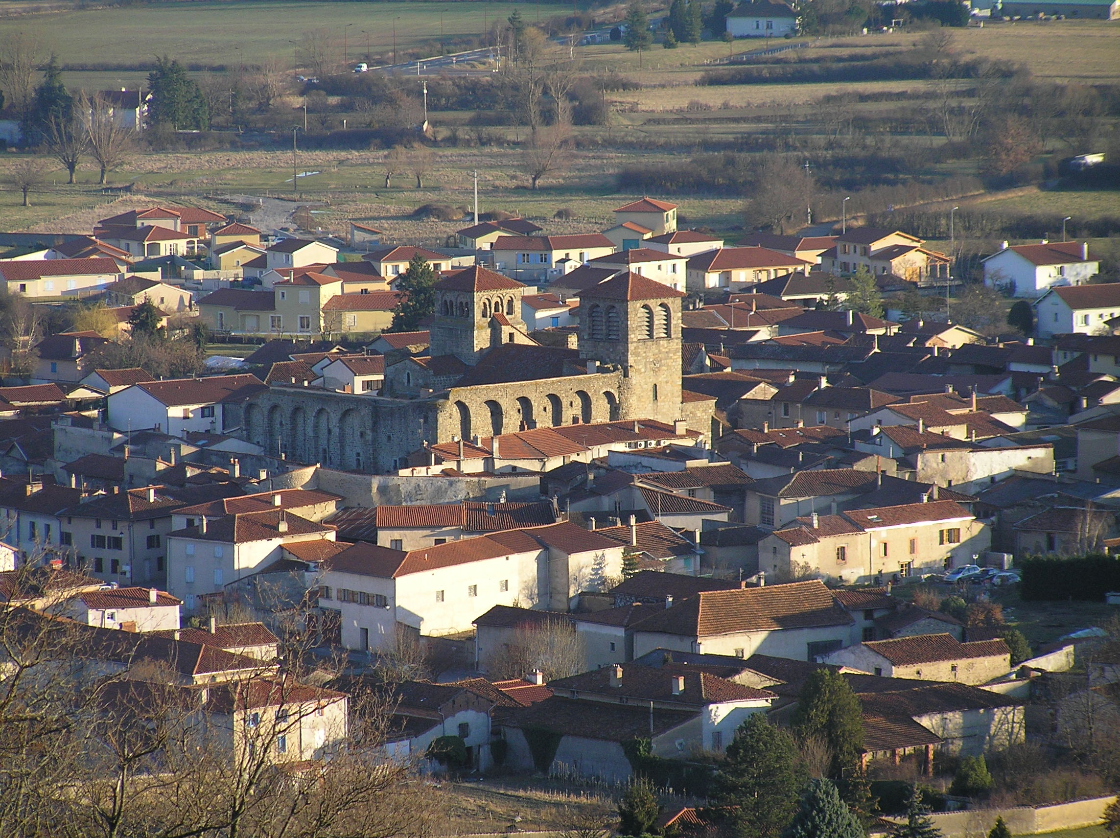 Champdieu, Loire - Vue générale